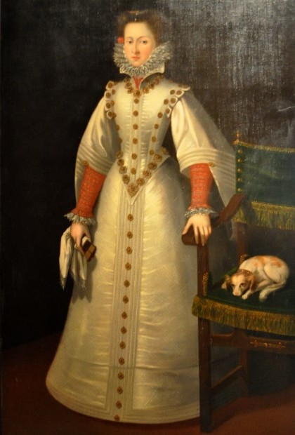 Polyxena z Pernštejna